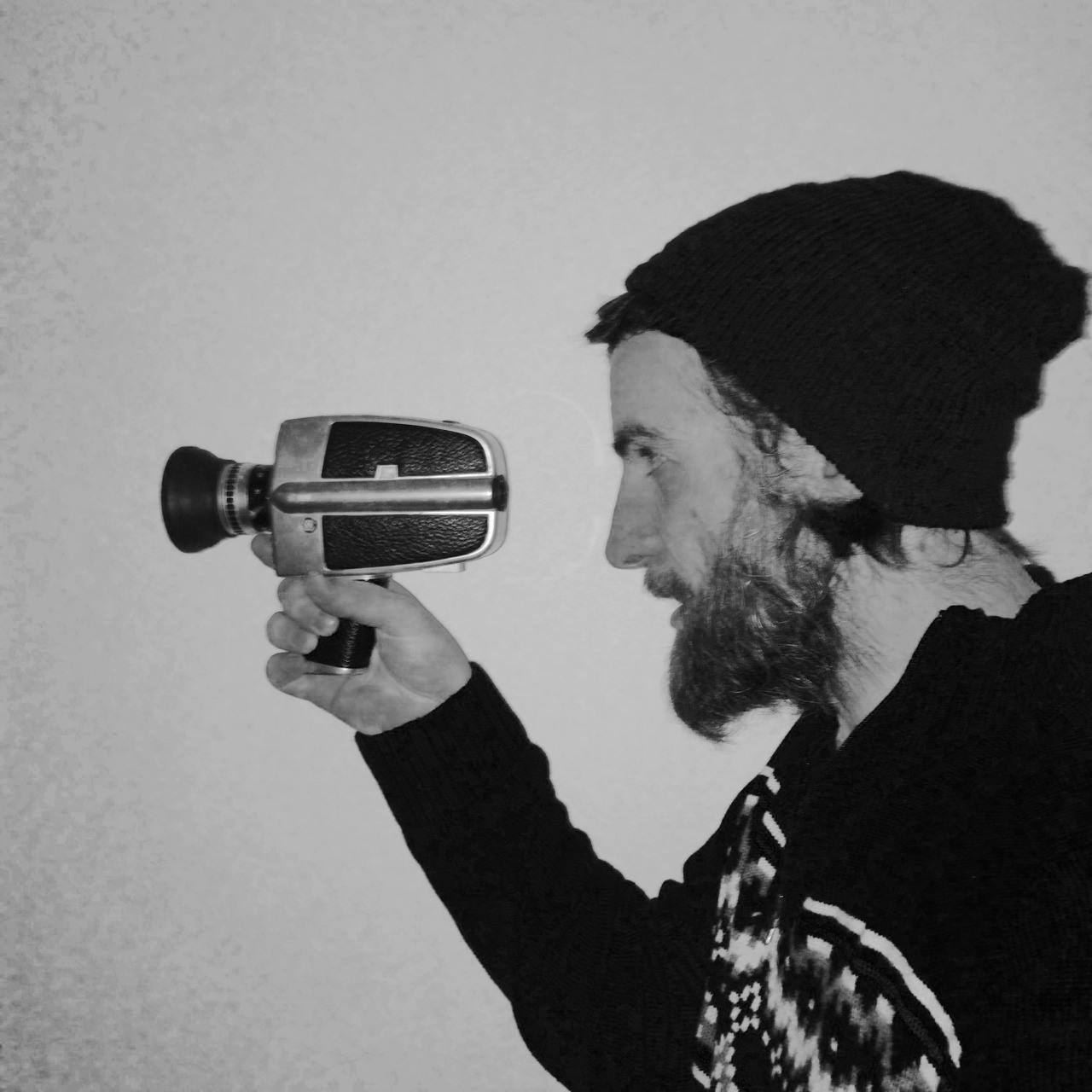 Vasee